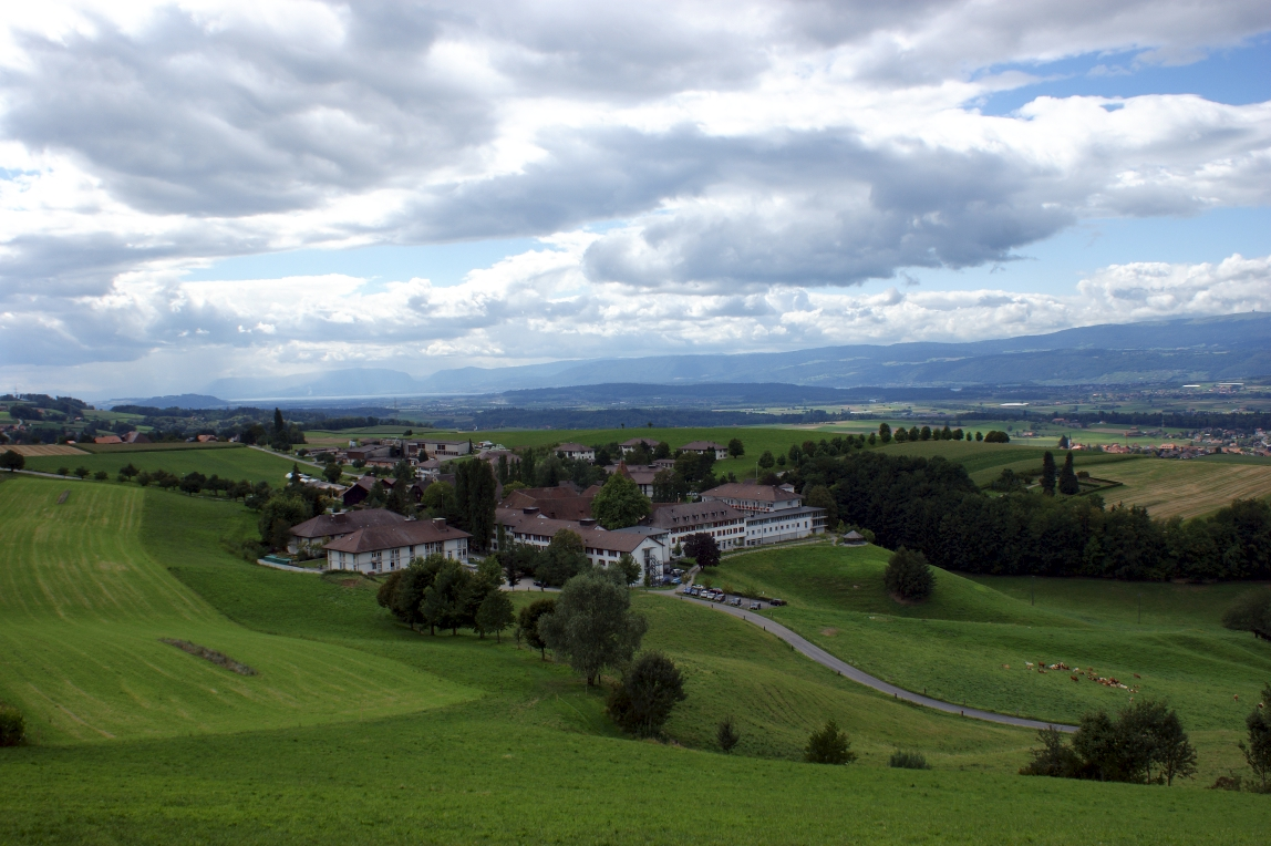 Frienisberg - Dorf Gesamtansicht mit Berner Seeland und Jura im Hintergrund - DSC03844.JPG